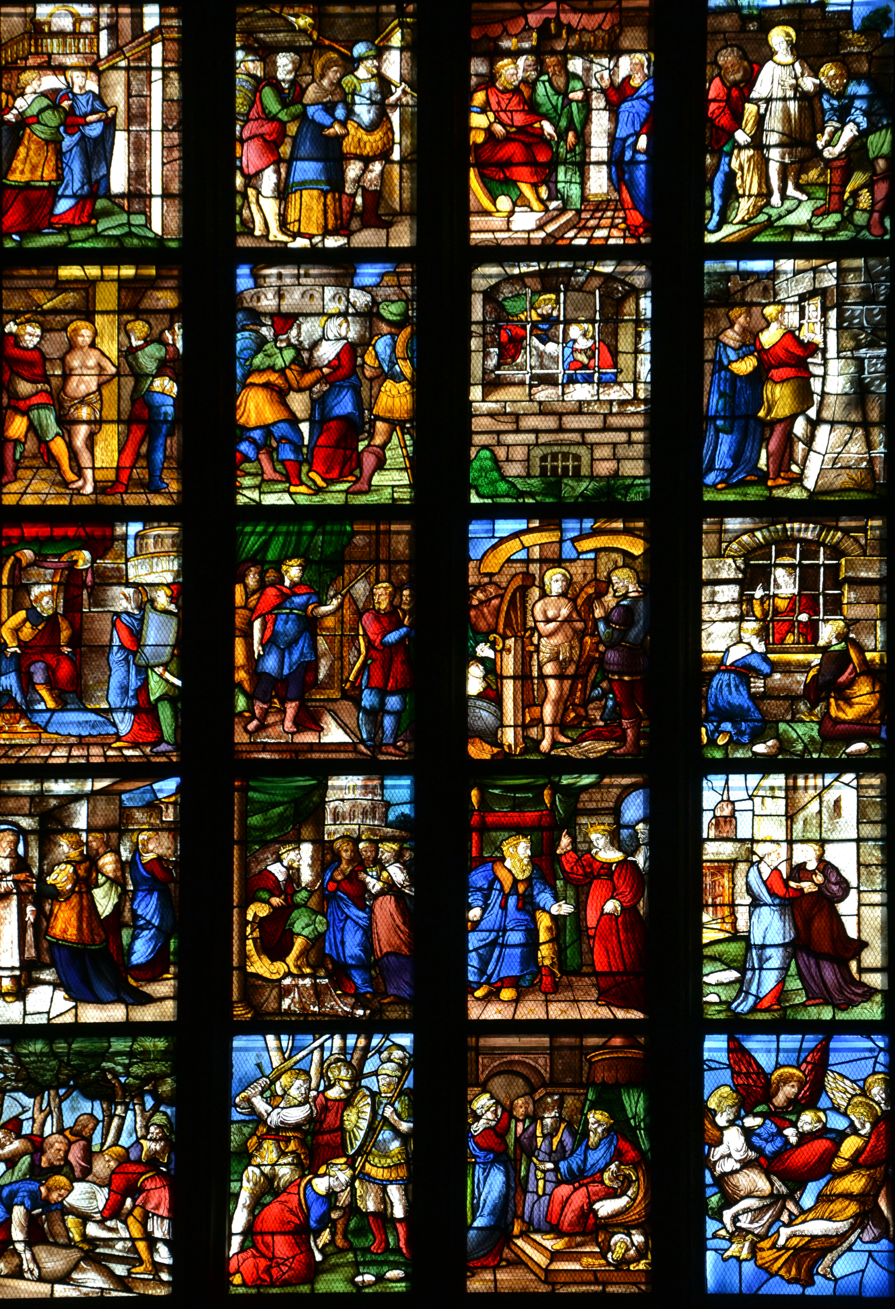 Milano, Duomo, Vetrata di santa Caterina, Braccio sud del transetto, XVI secolo disegnata da Biagio e Giuseppe Arcimboldi e realizzata da Corrado de' Mochis